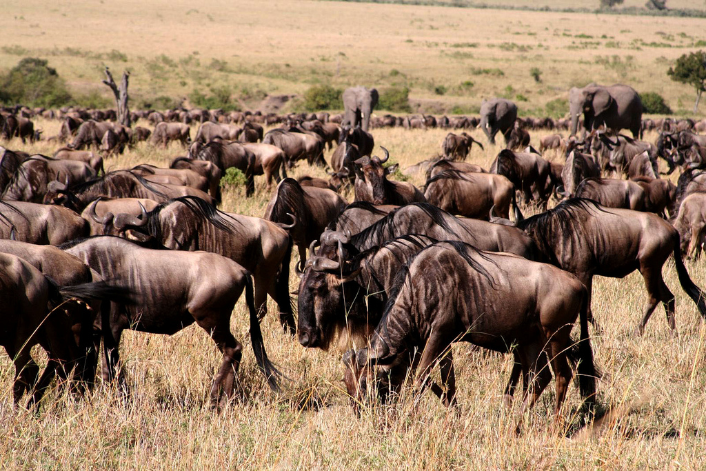 Ulanga, Tanzania